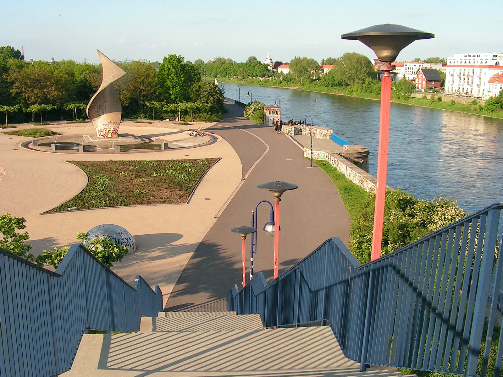 Elbuferpromenade Magdeburg. Ernst-Reuter-Allee zum Schleinufer. Foto 2005 von Wolfgang Pehlemann, Wiesbaden